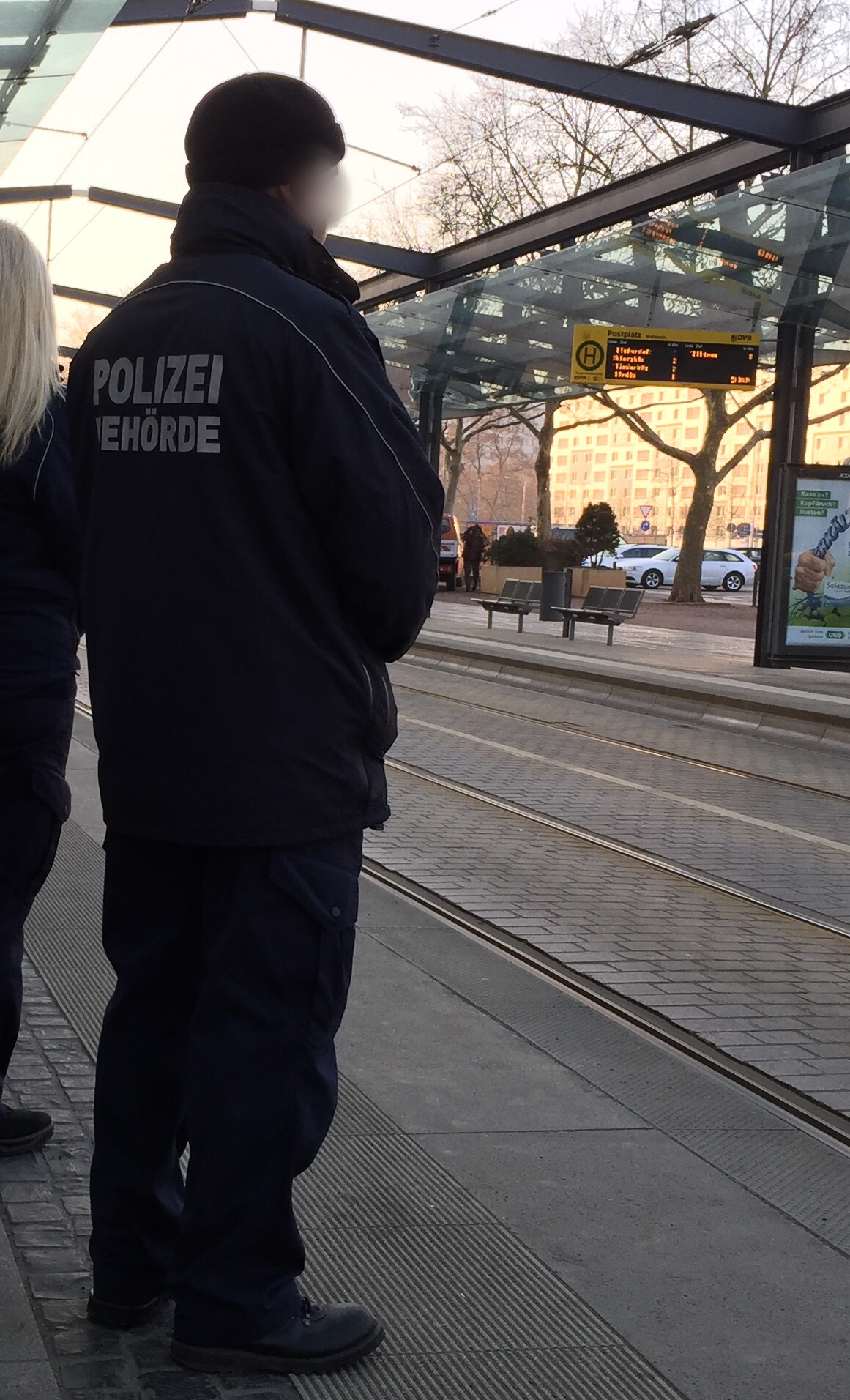 Uniform Polizeibehörde der Landeshauptstadt Dresden an der Haltestelle Postplatz